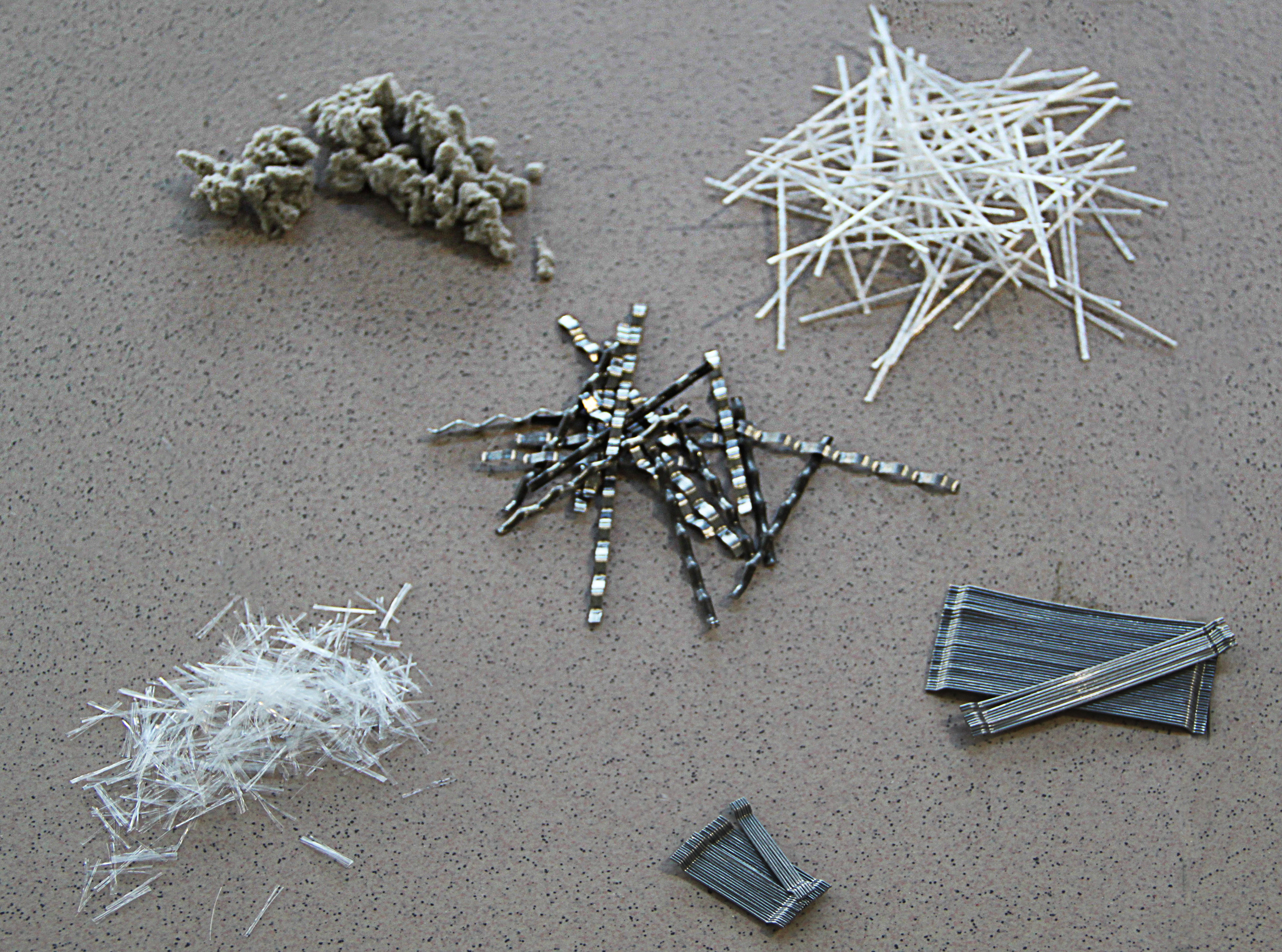 Różne rodzaje włókien (celulozowe, polipropylenowe, stalowe)